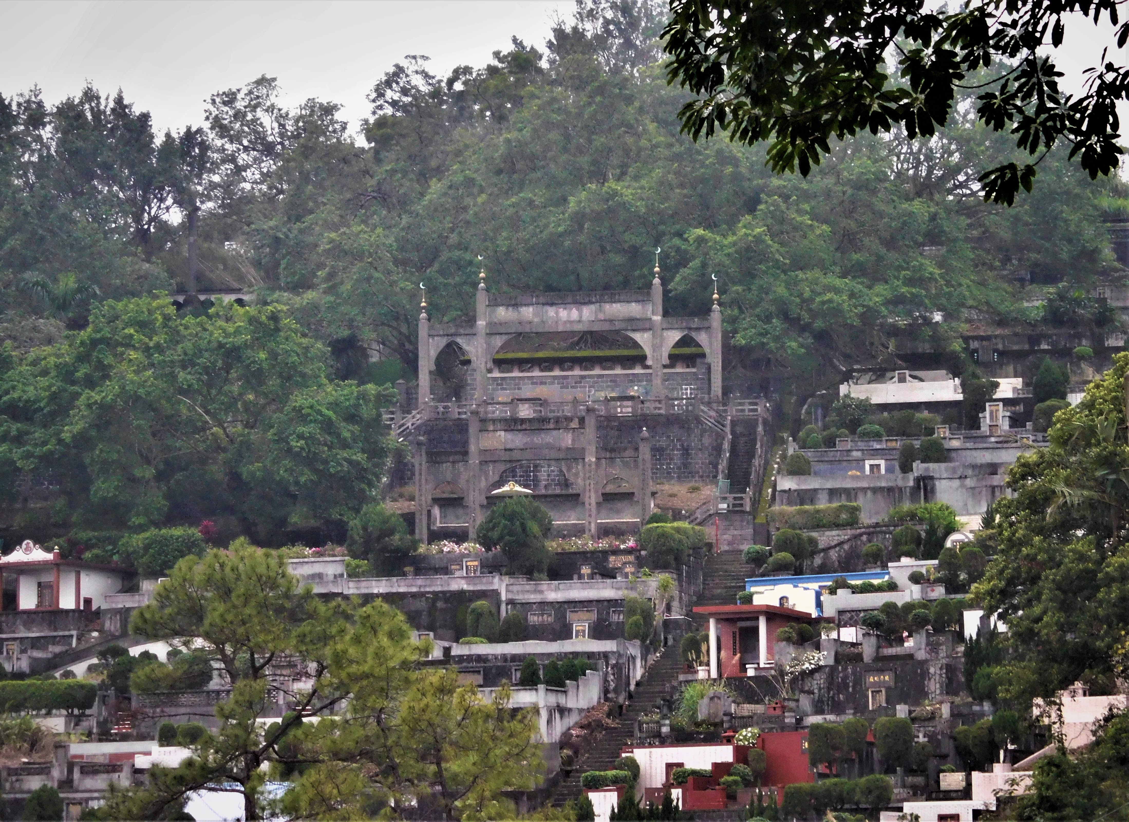 中文（台灣）: 白榕蔭堂墓園(白崇禧將軍墓)民國52年，白夫人馬佩璋女士過世，白崇禧將軍於回教公墓內闢建｢白榕蔭堂墓園｣，為白將軍留學美國學建築之兒子所設計、大陸工程公司興建，殆民國55年白崇禧將軍過世後亦安葬於此。